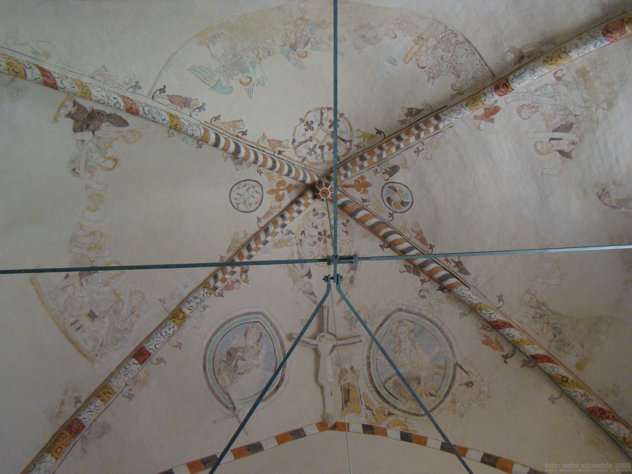 Dorfkirche Altkalen, Deckengemälde